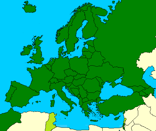 Mapa zemalja učesnica Eurosonga